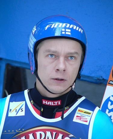 Risto Jussilainen - fiński skoczek narciarski podczas Pucharu Świata w skokach narciarskich Zakopane 2006.